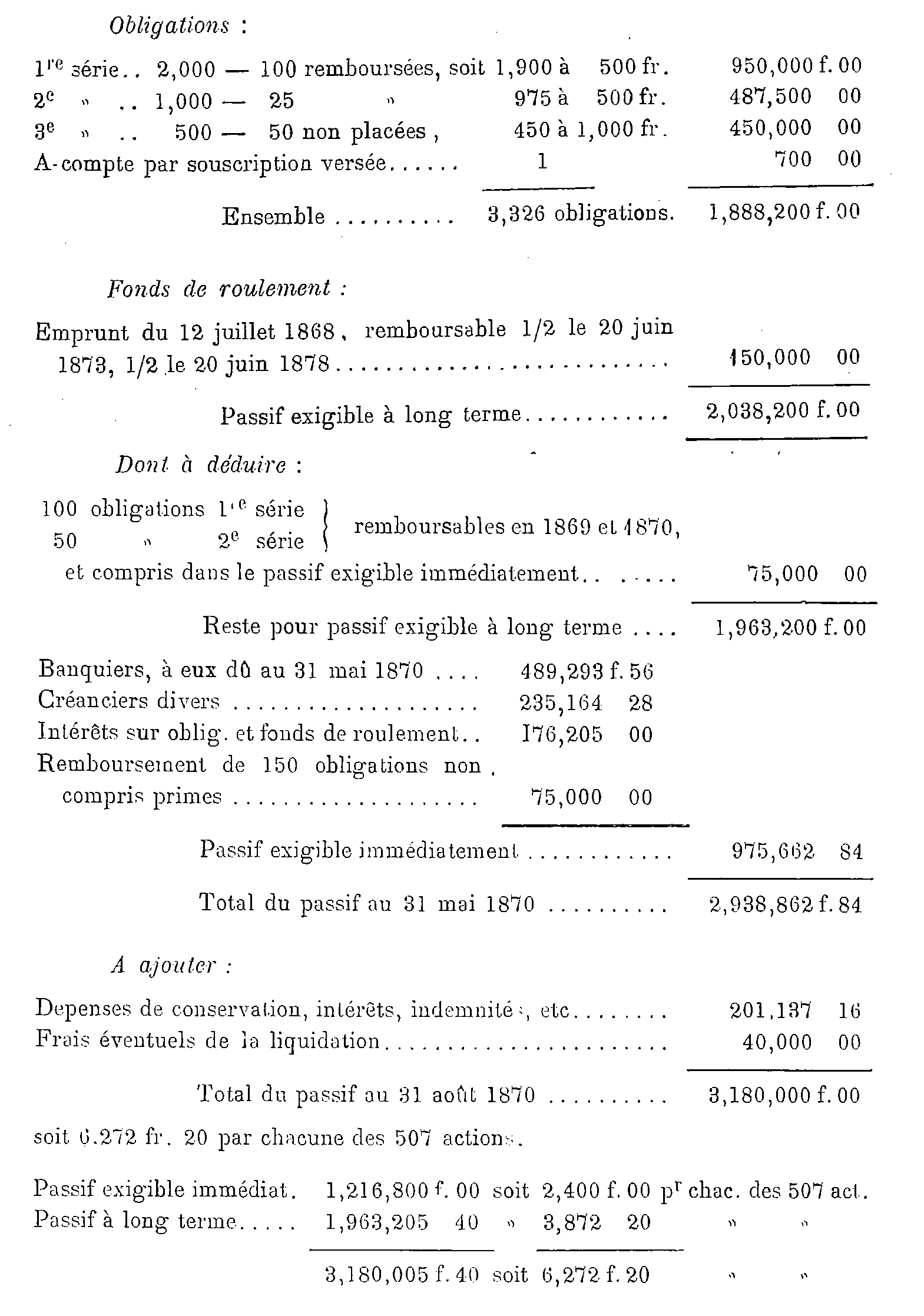 Passif au 31 août 1870 de la Société de Fiennes.